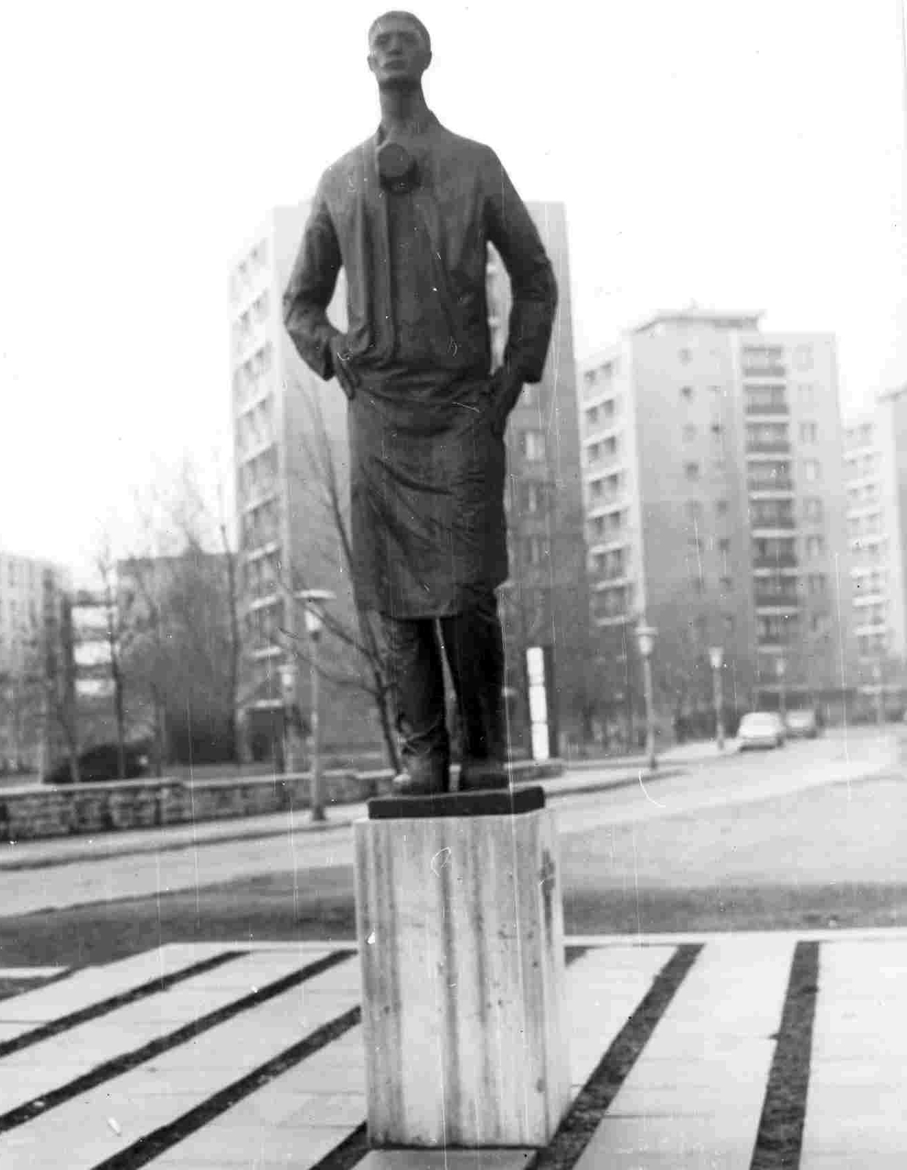 József Attila lakótelep, Dési Huber utca 20. Vegyipari Munkás szobra, alkotó: Konyorcsik János. Location: Hungary, Budapest IX. Tags: sculpture, blocks, Budapest Title: József Attila lakótelep, Dési Huber utca 20. Vegyipari Munkás szobra, alkotó: Konyorcsik János.